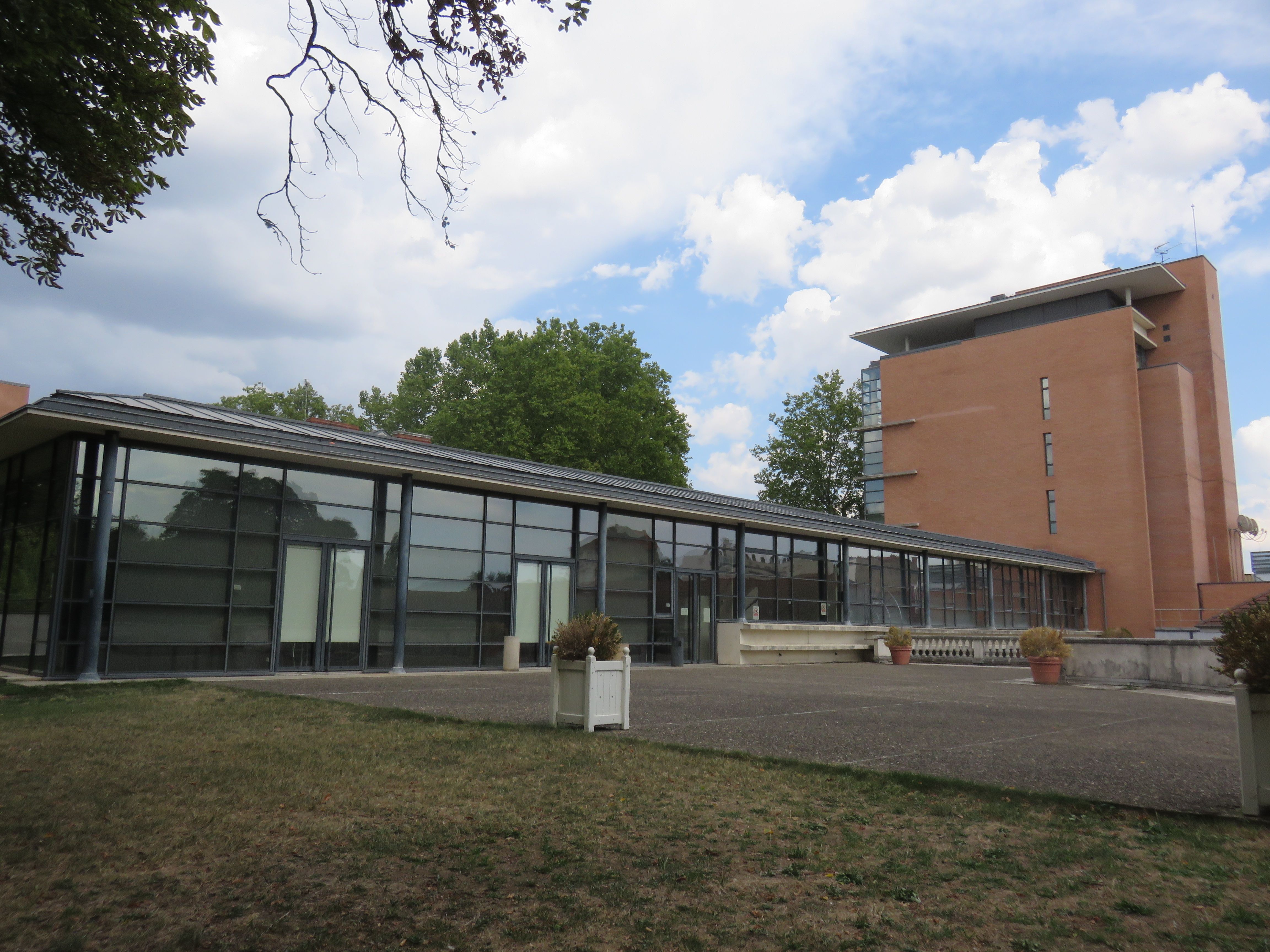 Vue du pôle universitaire Lardy à Vichy (Allier, France).